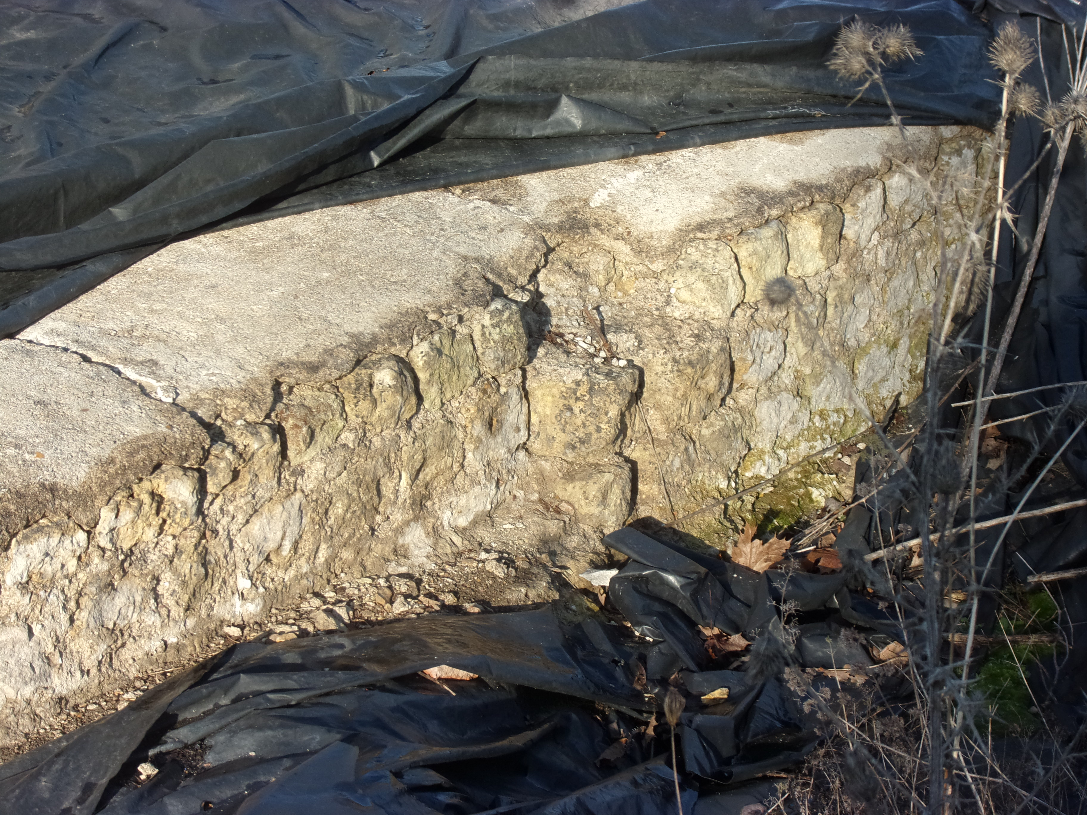 Mur en petit appareil de la cella du fanum (Amboise)